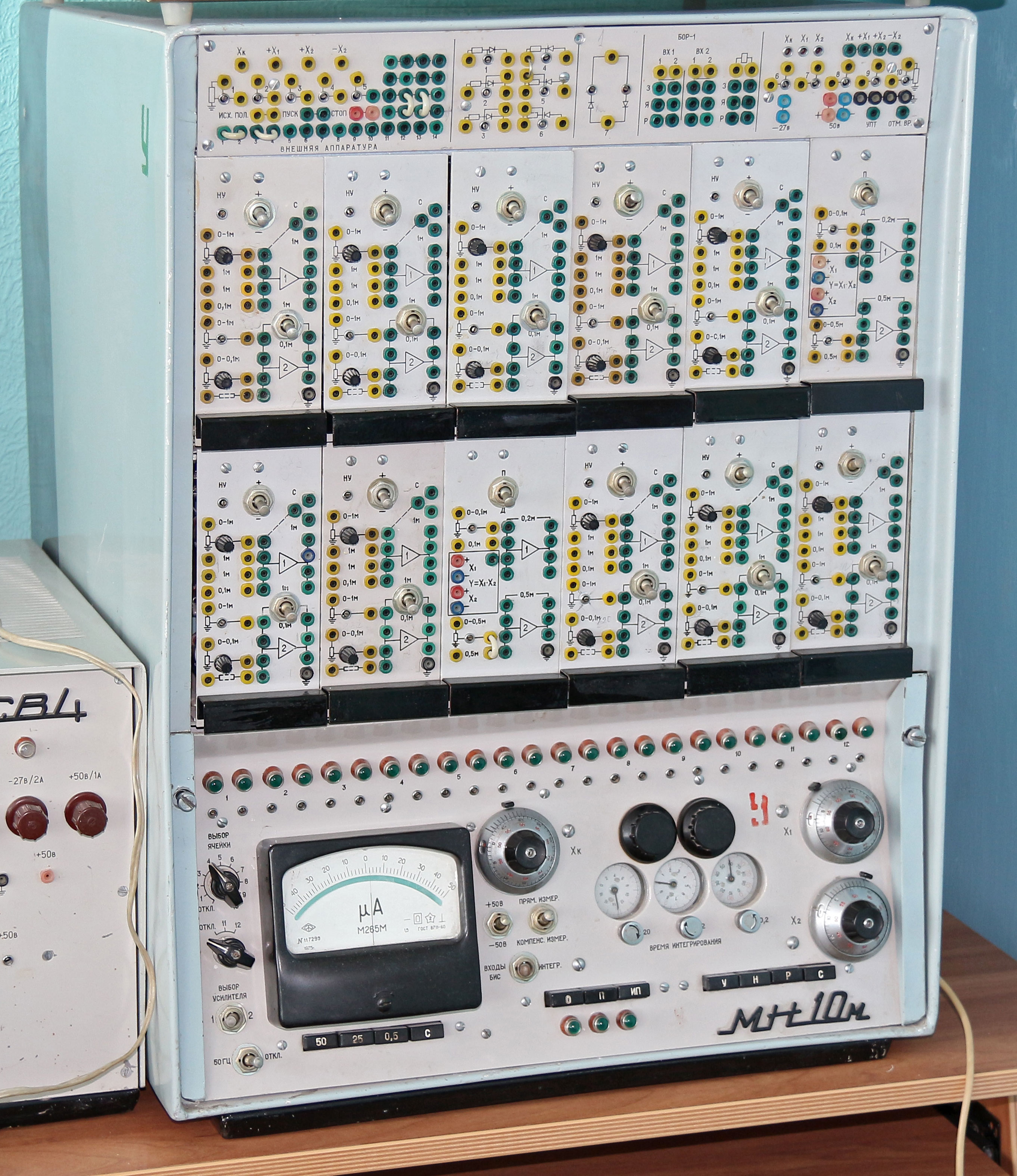 МН-10М